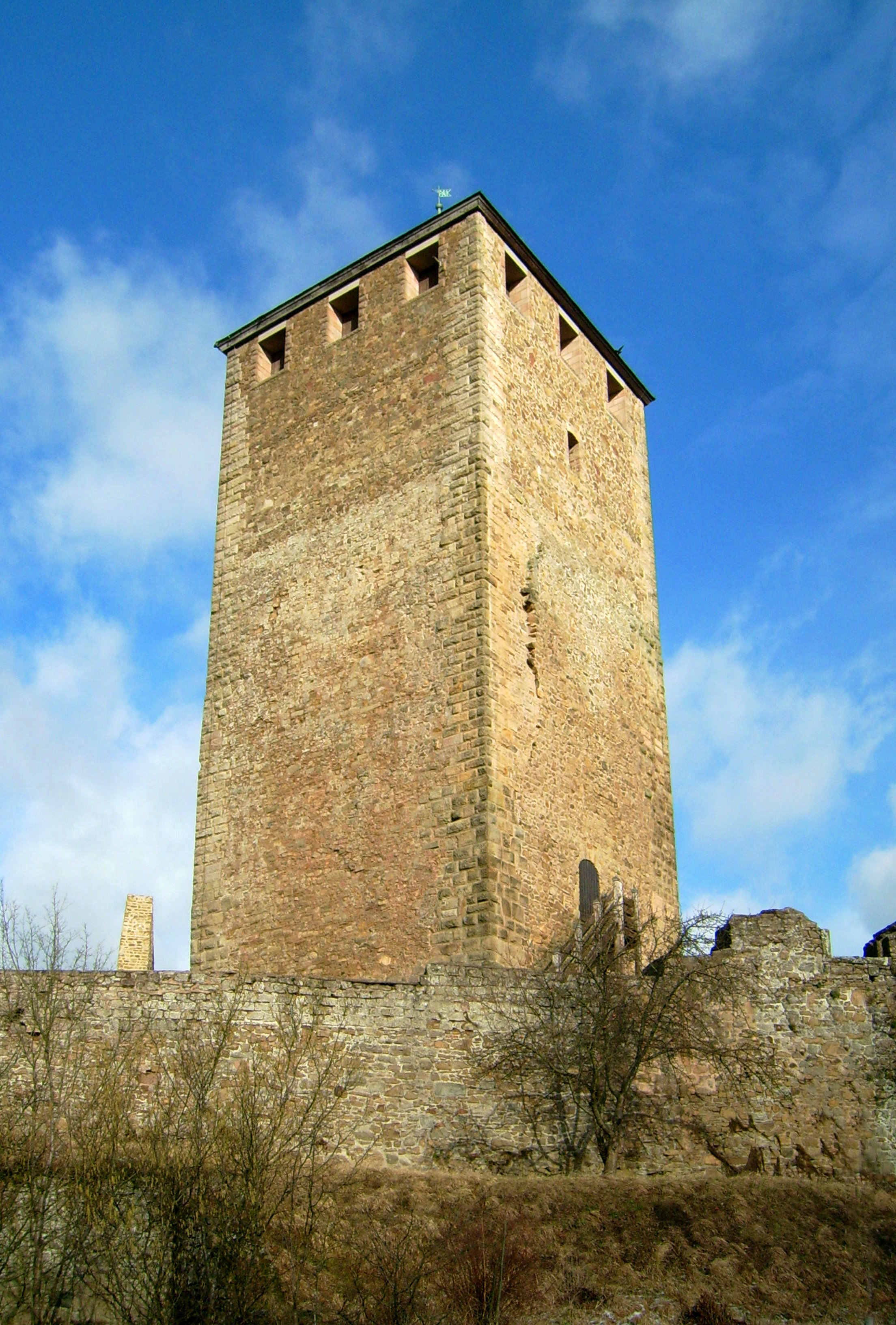 Turm der Burg Lichtenberg